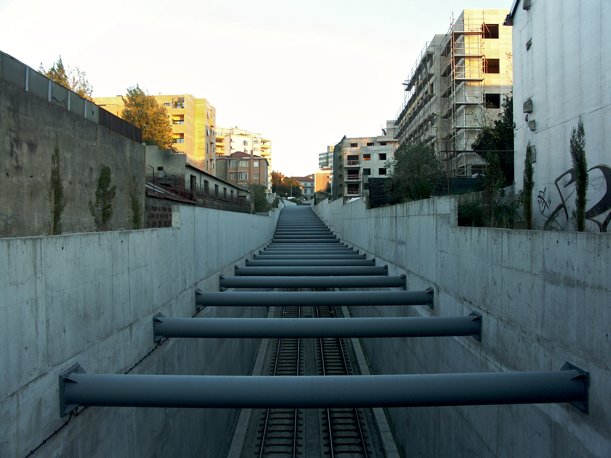 Nas imediações da estação Casa da Música (Metro do Porto).